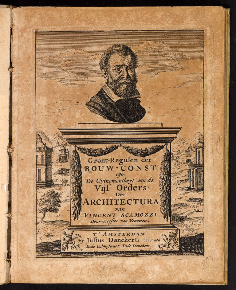 map